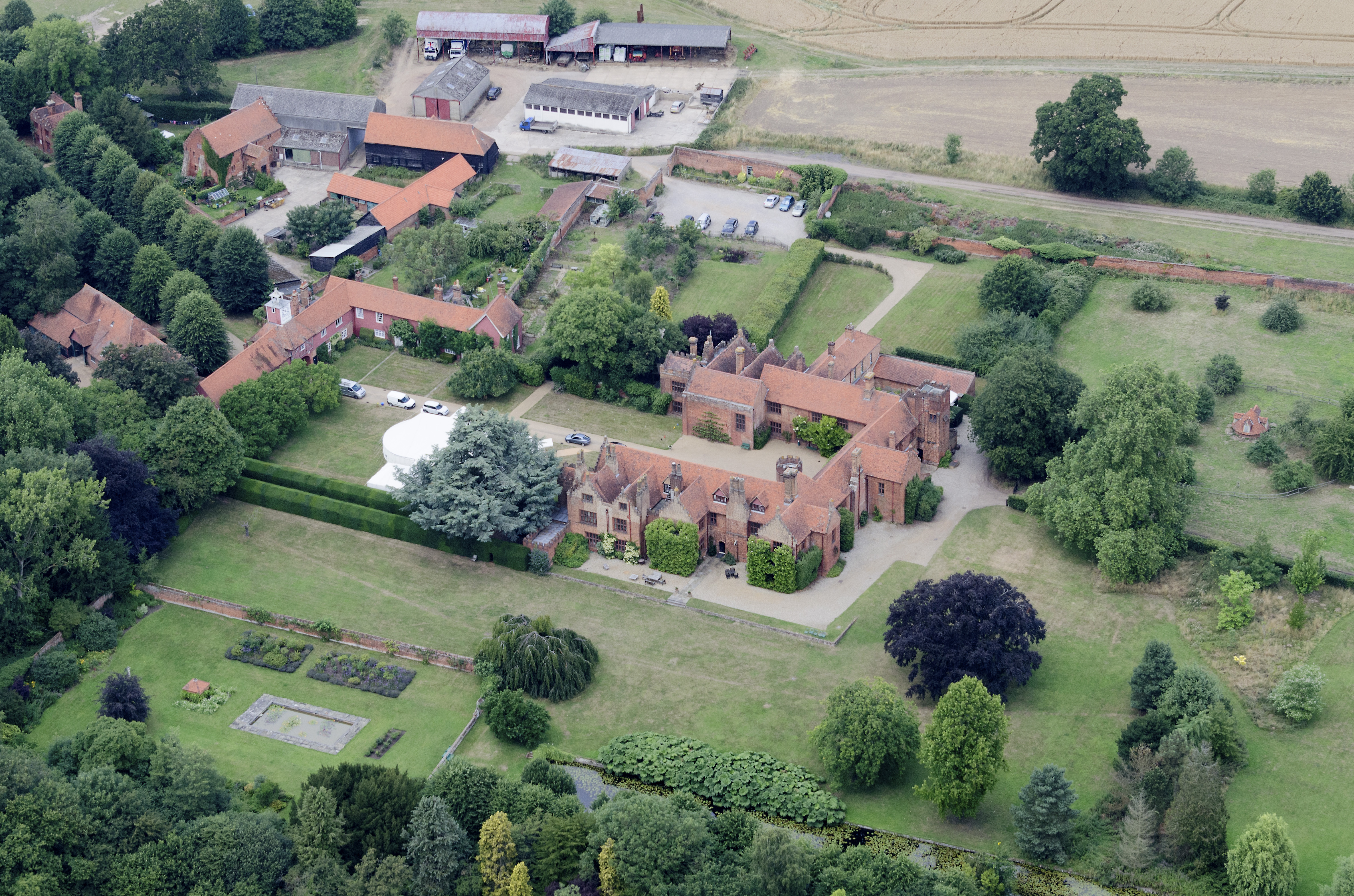 Essex aerial